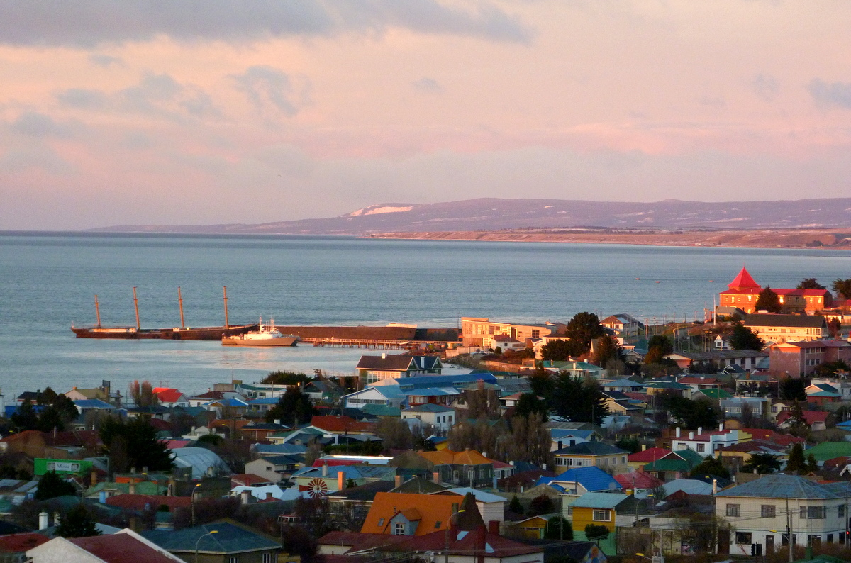 Punta Arenas, con los navios de atraque County of Peebles (ship) y el Cavenga